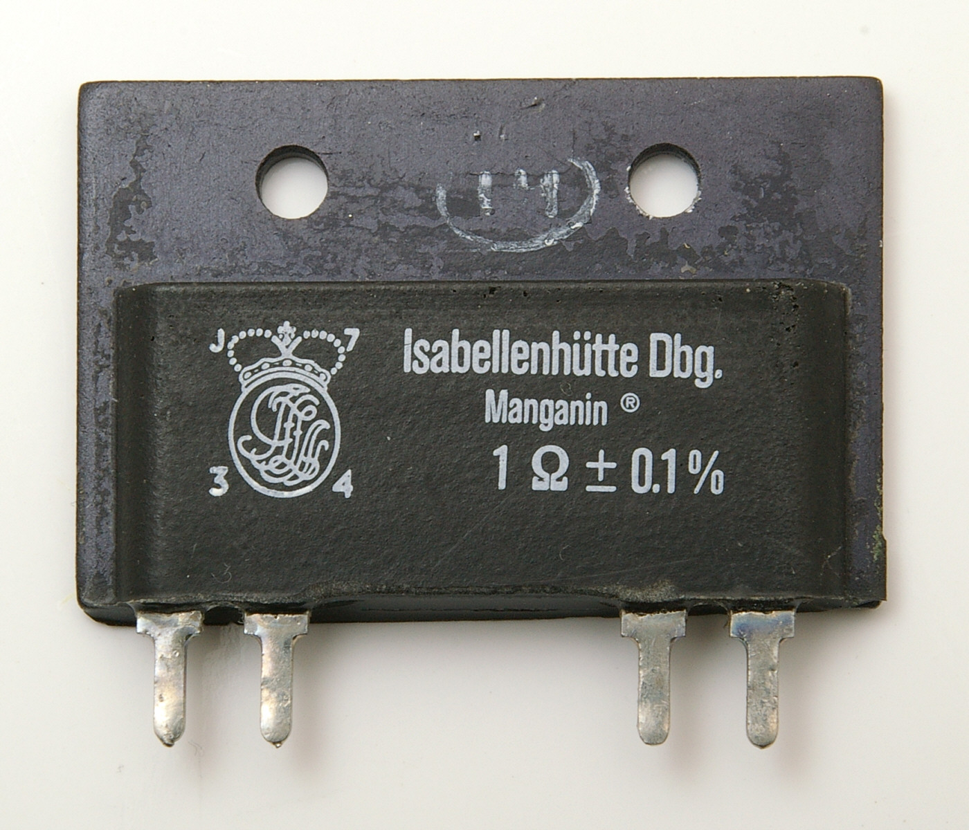 Indunktionsarmer Präzisionswiderstand mit Vierleiteranschluss der Isabellenhütte Dillenburg mit einem TK unter 10 und einer Belastbarkeit von 10 Watt bei Kühlkörpermontage.